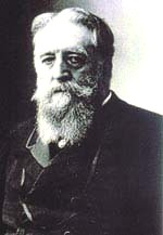 Juriste, administrateur et diplomate français Eugène Poubelle (1831–1907)